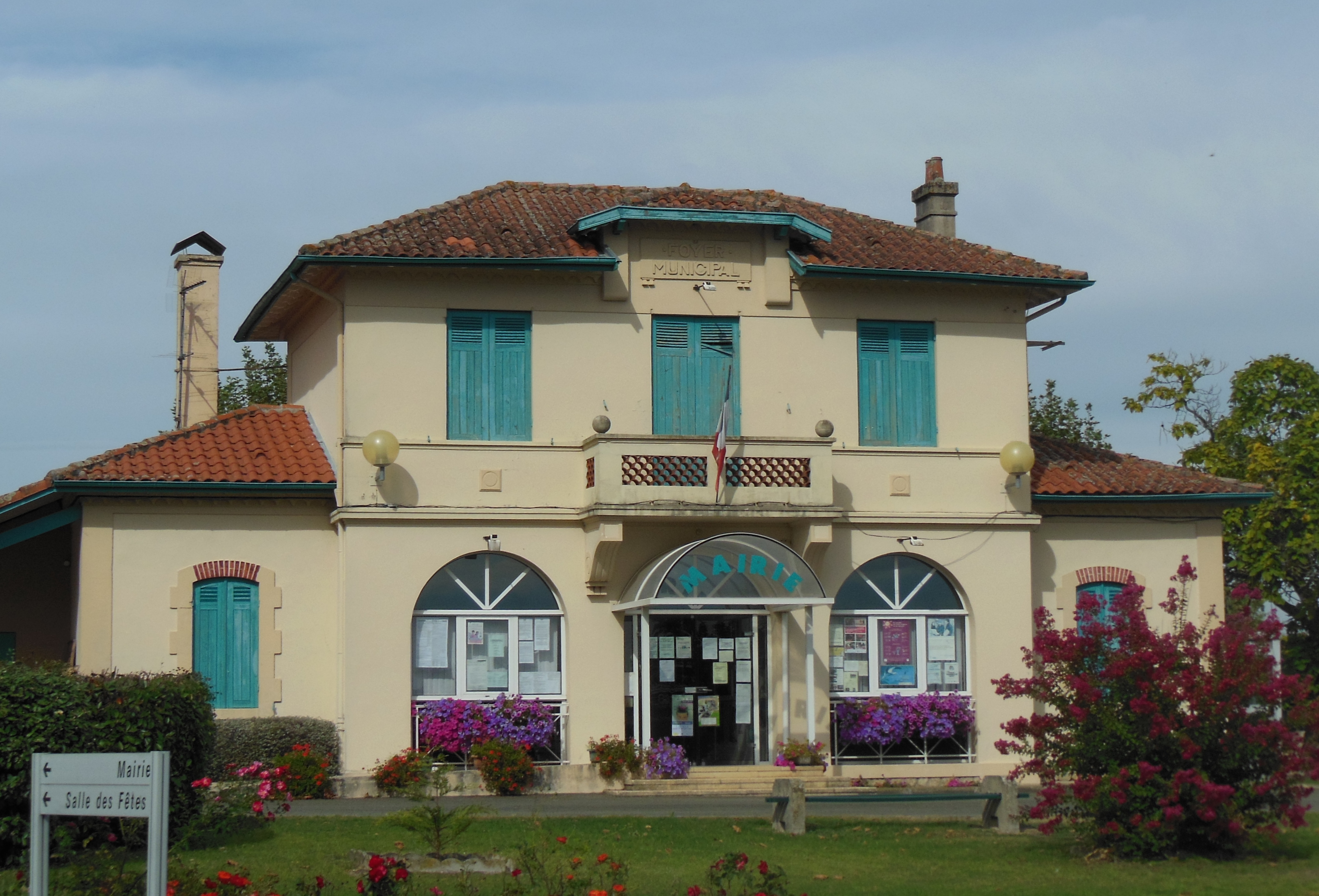 Mairie de Saint-Gor, dans le département français des Landes